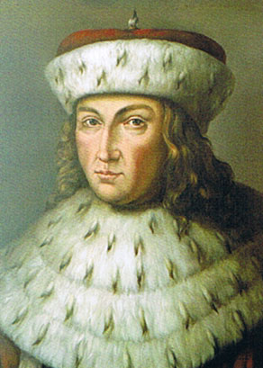 Kurfürst Friedrich II. von Brandenburg